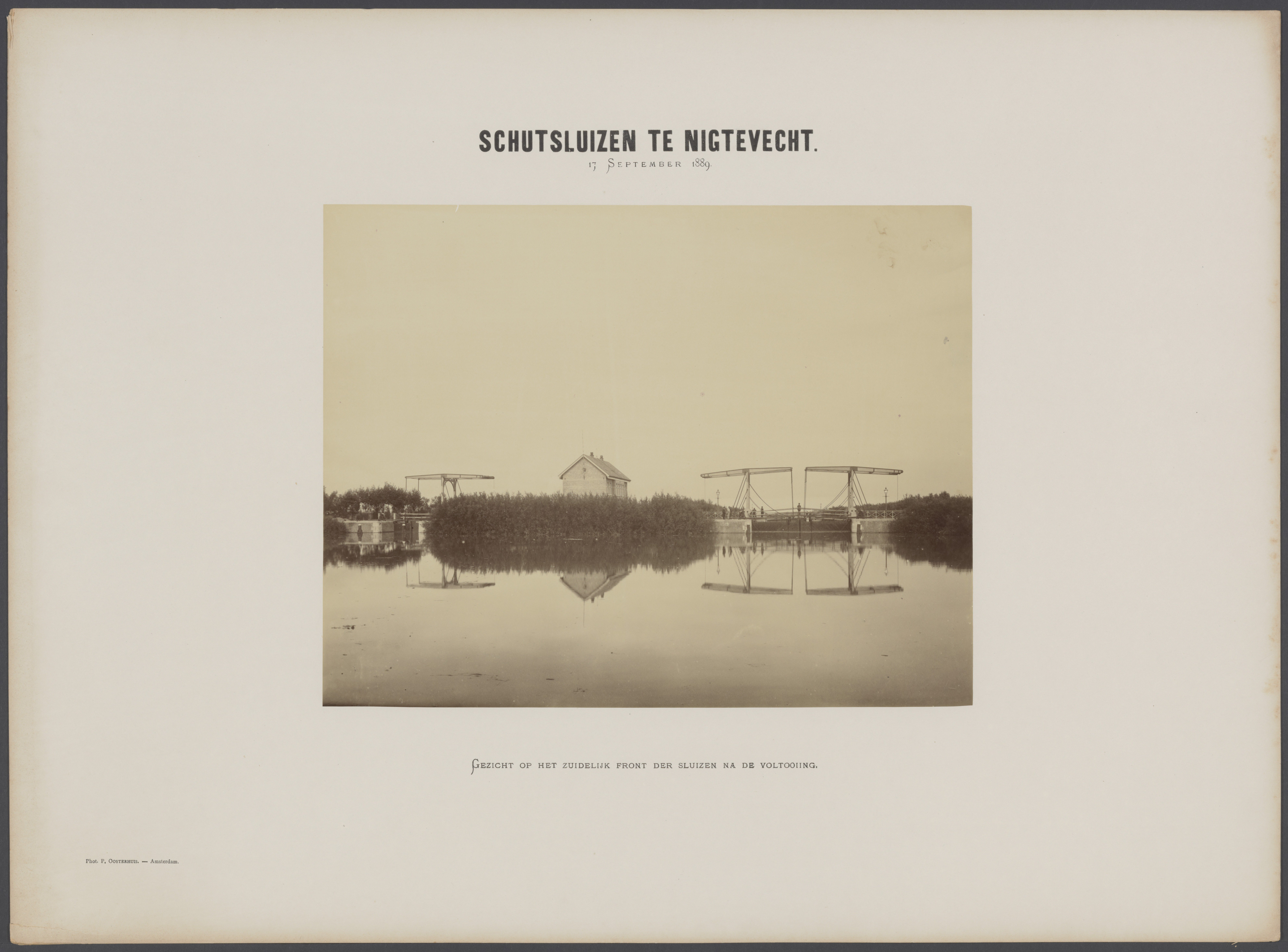 Collectie / archief : Fotocollectie Rijkswaterstaat : Metadata : Collectie / Archief : Fotocollectie Rijkswaterstaat Reportage / Serie : Merwedekanaal ten zuiden van Utrecht Beschrijving : Schutsluizen te Nigtevecht. Gezicht op het zuidelijk front der sluizen na de voltooiing Datum : 17 september 1889 Locatie : Loenen, Loenen, Utrecht (prov.) Trefwoorden : ophaalbruggen, schutsluizen, sluiswachterswoningen, waterbouw Fotograaf : Oosterhuis, Pieter Auteursrechthebbende : Public Domain logo Materiaalsoort : Foto (zwart/wit) Nummer archiefinventaris : bekijk toegang 2.24.11 Inventarisnummer : 79 Bestanddeelnummer : 712